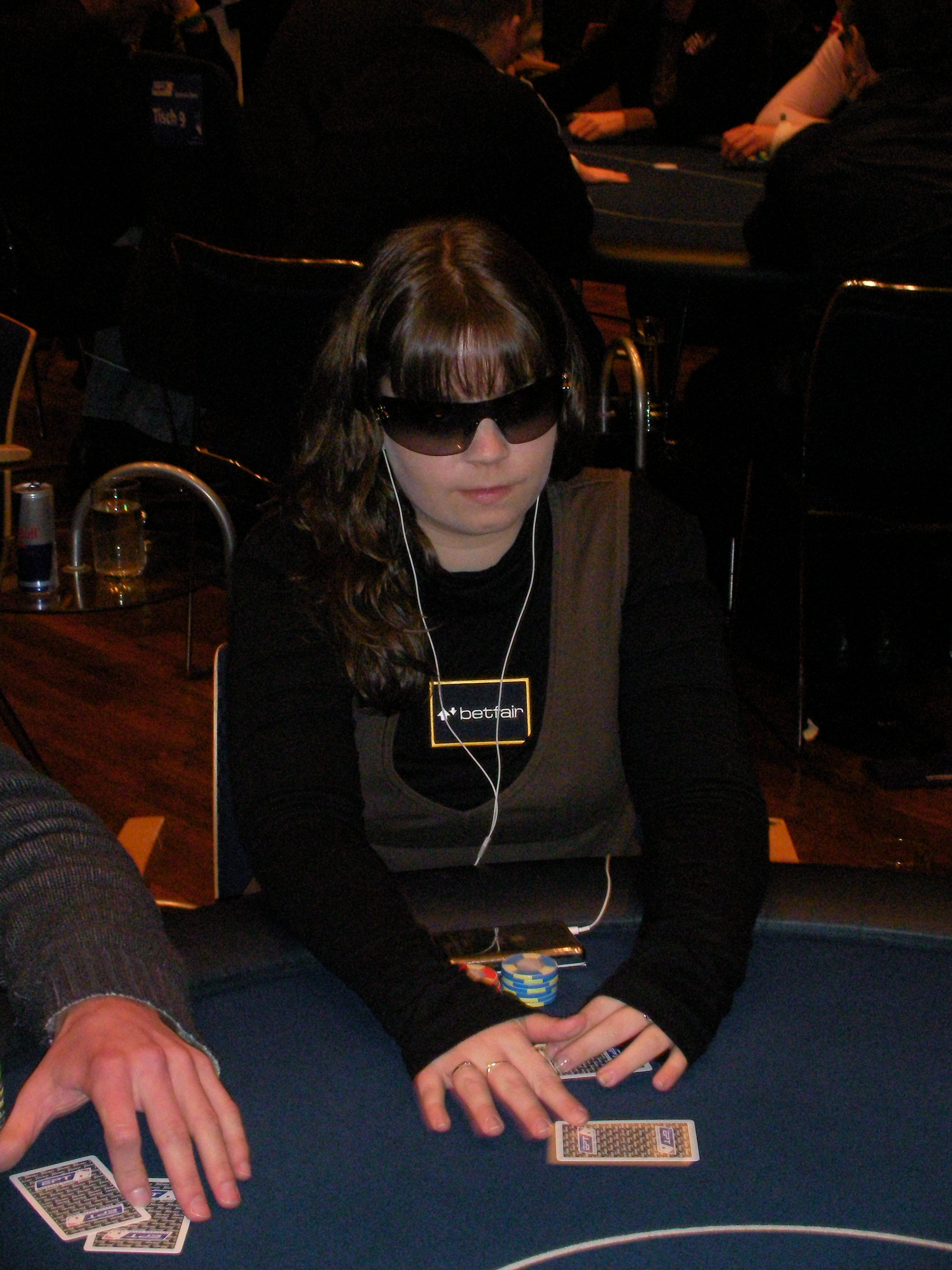 Annette Obrestad at the EPT German Open in Spielbank Hohensyburg, Dortmund